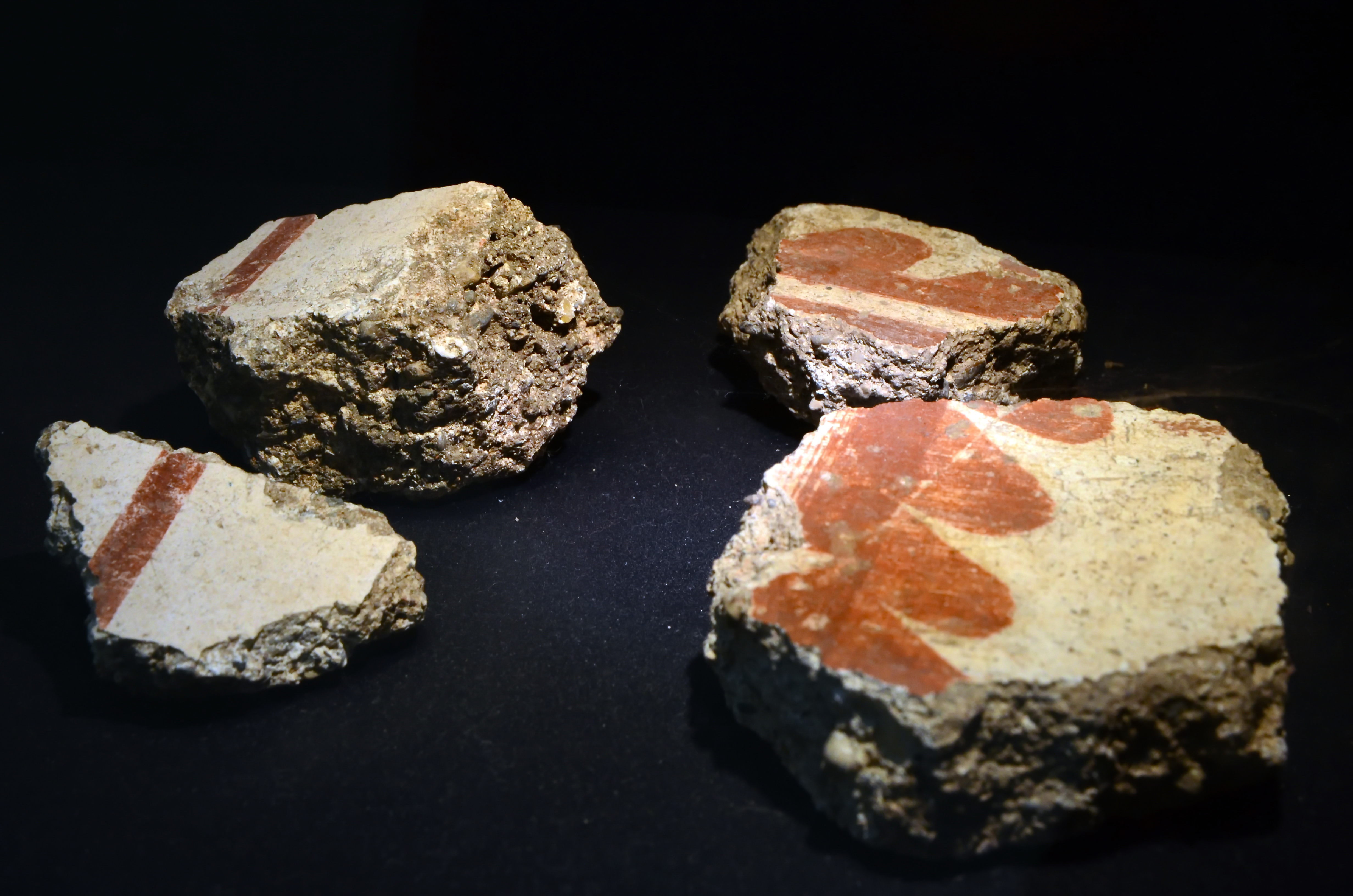 Exponat aus der Thermengasse im einstigen römischen vicus Turicum (Zürich) : Verputzreste von bemalten Wänden aus den Bädern. Beim Bad II aus dem 2./3. Jahrhundert mit feinen farbigen Linien auf grossflächig weissen Wänden. (gemäss Beschriftung in der Vitrine)